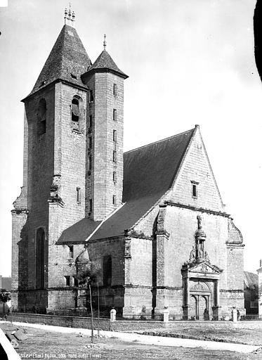 Porte de la façade ouest de l'église Saint-Pierre d'Assier.